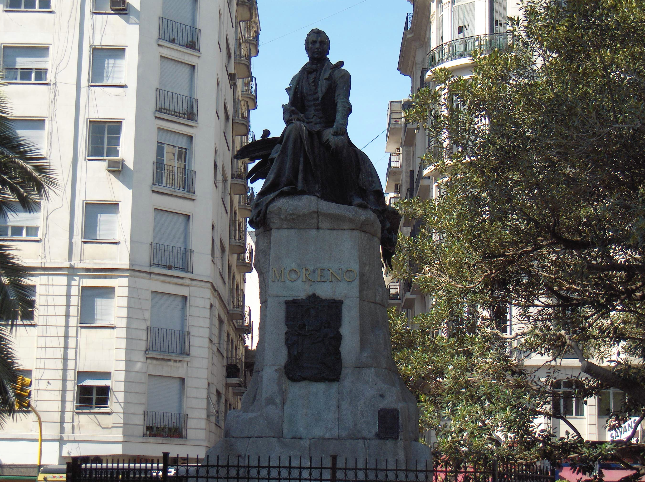 Monumento a Mariano Moreno, ubicado en la plaza homónima de la Ciudad de Buenos Aires